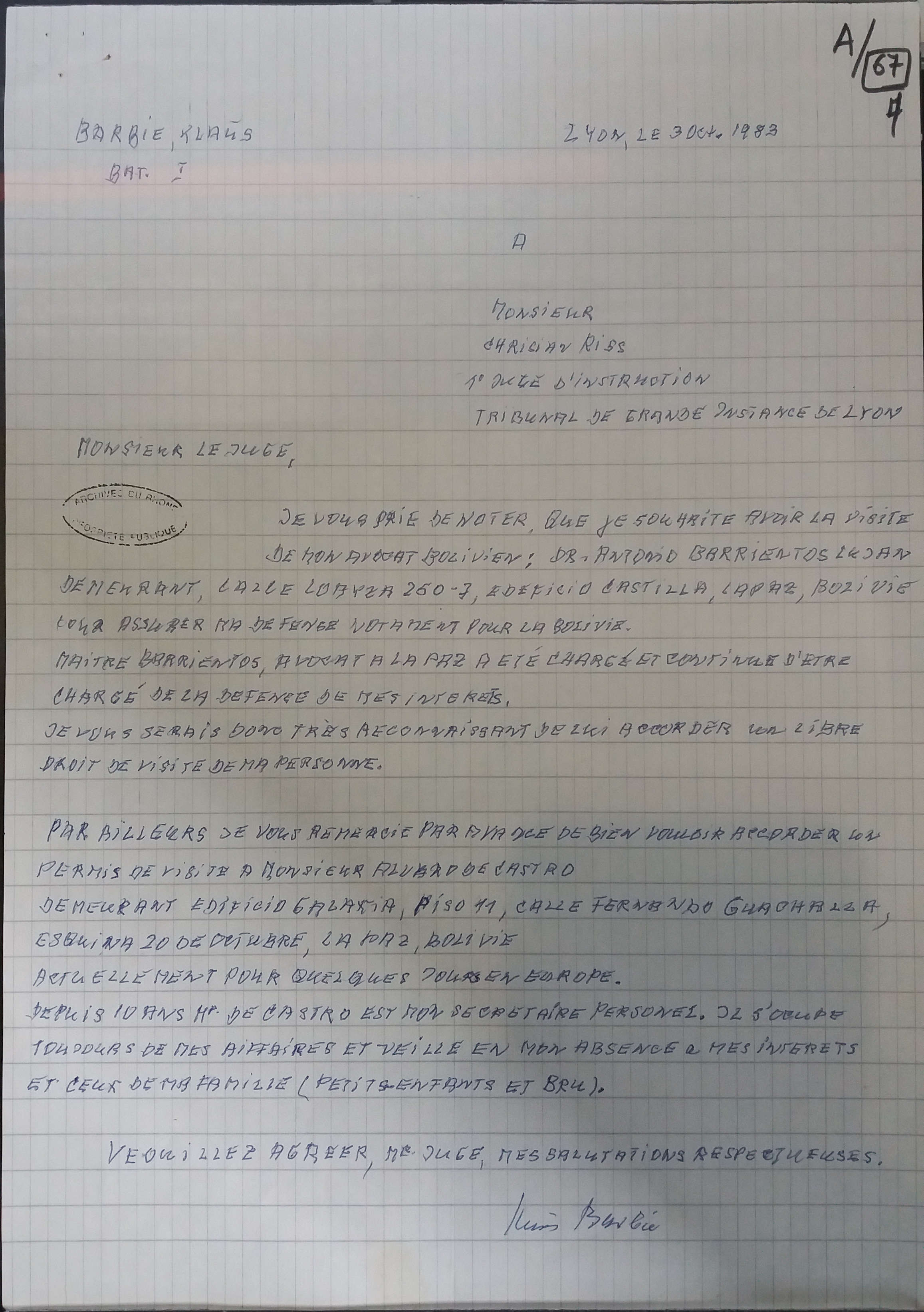 Demande de Klaus Barbie à Christian Riss, juge d'instruction, pour le droit de visite de son avocat bolivien Antonio Barrientos, et de son secrétaire personnel, Alvaro de Catro. Lettre du 30 octobre 1983. Archives départementales du Rhône, cote 4544 W.